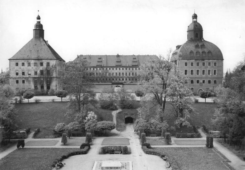 Gotha, Schloss Friedenstein Zentralbild Erfurt Wehse-Wittig 17.5.1956 Wjt-Qu. Die Landesbibliothek Gotha bereitet sich auf die Rückkehr von 270000 Bänden aus der Sowjetunion vor. Ein freudiges Echo hat die angekündigte Rückkehr von ca. 270.000 Bänden, die sich vorübergehend in der Sowjetunion befanden, in allen Kreisen der Bevölkerung und vor allen Dingen bei den Bibliothekaren ausgelöst. Die Landesbibliothek Gotha, die zur Zeit als Zentralstelle für wissenschaftliche Altbestände der DDR fungiert, befindet sich in den Räumen des Schlosses Freidenstein. .-Die Anfänge der herzoglichen Bibliothek reichen bis in das Jahr 1660 zurück. Die Bibliothek selbst ging nach dem Ersten Weltkrieg in die Hände des Staates über und erhielt die Bezeichnung "Landesbibliothek Gotha". Schon jetzt werden, soweit dies möglich ist, die Vorkehrungen zur Aufnahme der ca. 270000 Bände getroffen. UBz: Blick in den Schlosshof, auf den Flügel und den Turm, in dem sich die Räume und das Magazin der Landesbibliothek Gotha befinden, an der gleichen Stelle, wo seit 1660 die herzogliche Bibliothek untergebracht war.